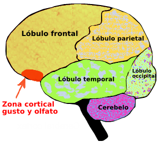 zone corticale préfrontale du gout